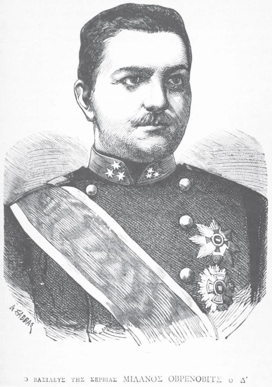 König Milan I. von Serbien